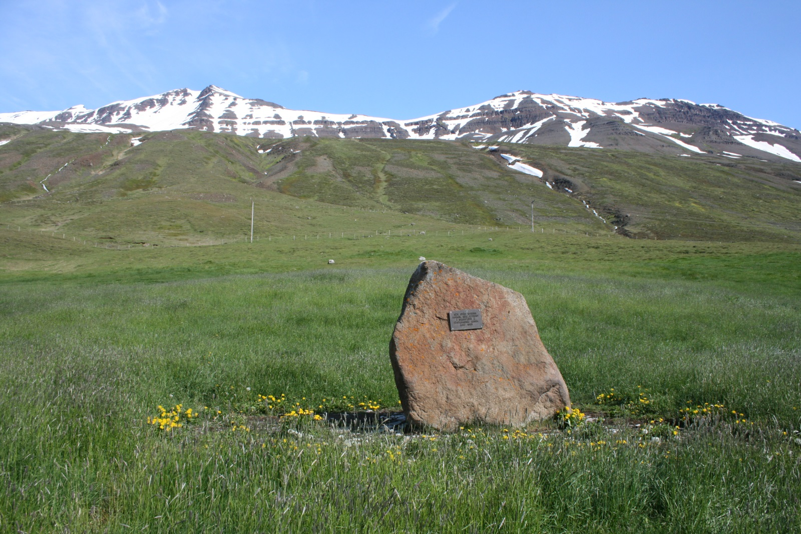 Minningarsteinn um bæinn Auðnir í Svarfaðardal